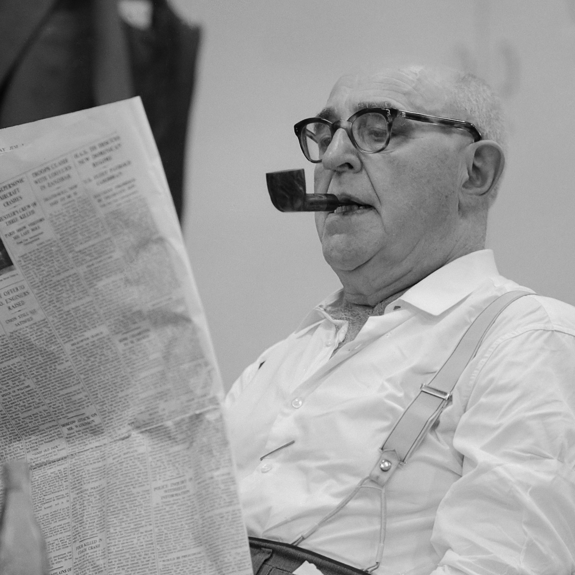 IBM schaaktoernooi . Bernstein 5 juni 1961